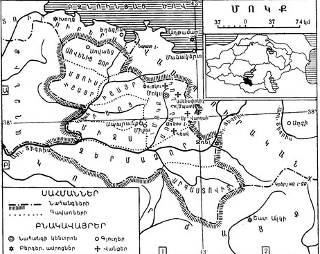 Մոկք Նահանգ